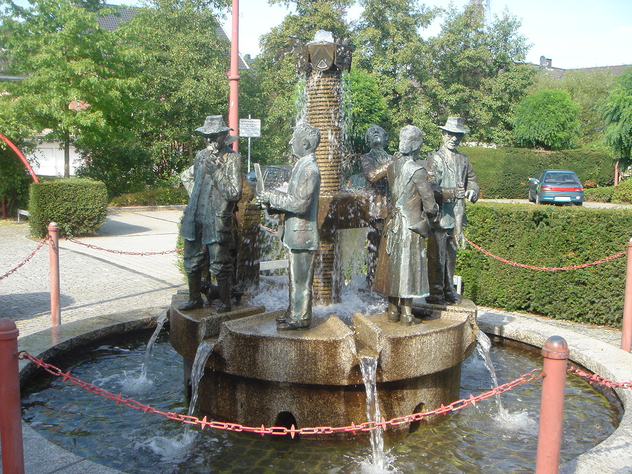 Stadtbrunnen